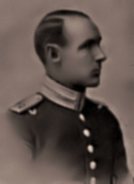 Karl Lillier